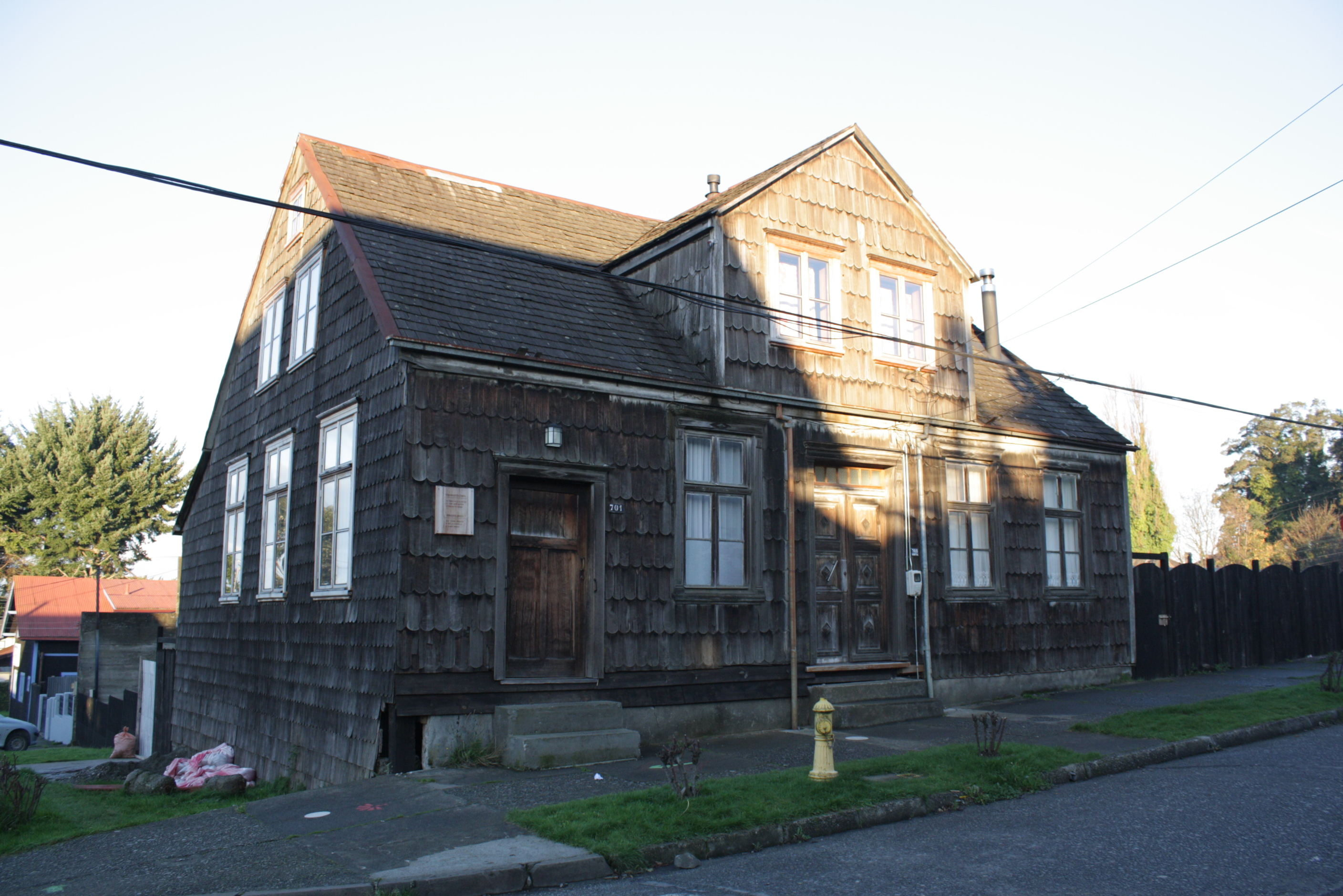 Casa Gotschlich This is a photo of a national monument in Chile: 729